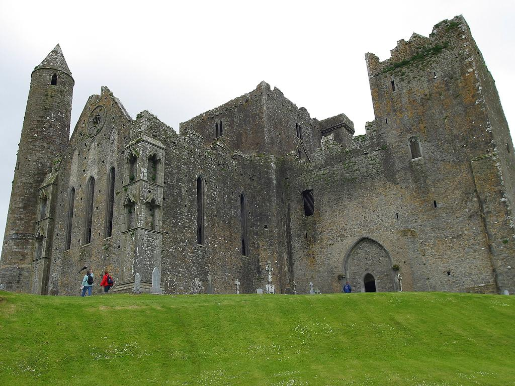 Exterior do Catelo roqueiro na Irlanda